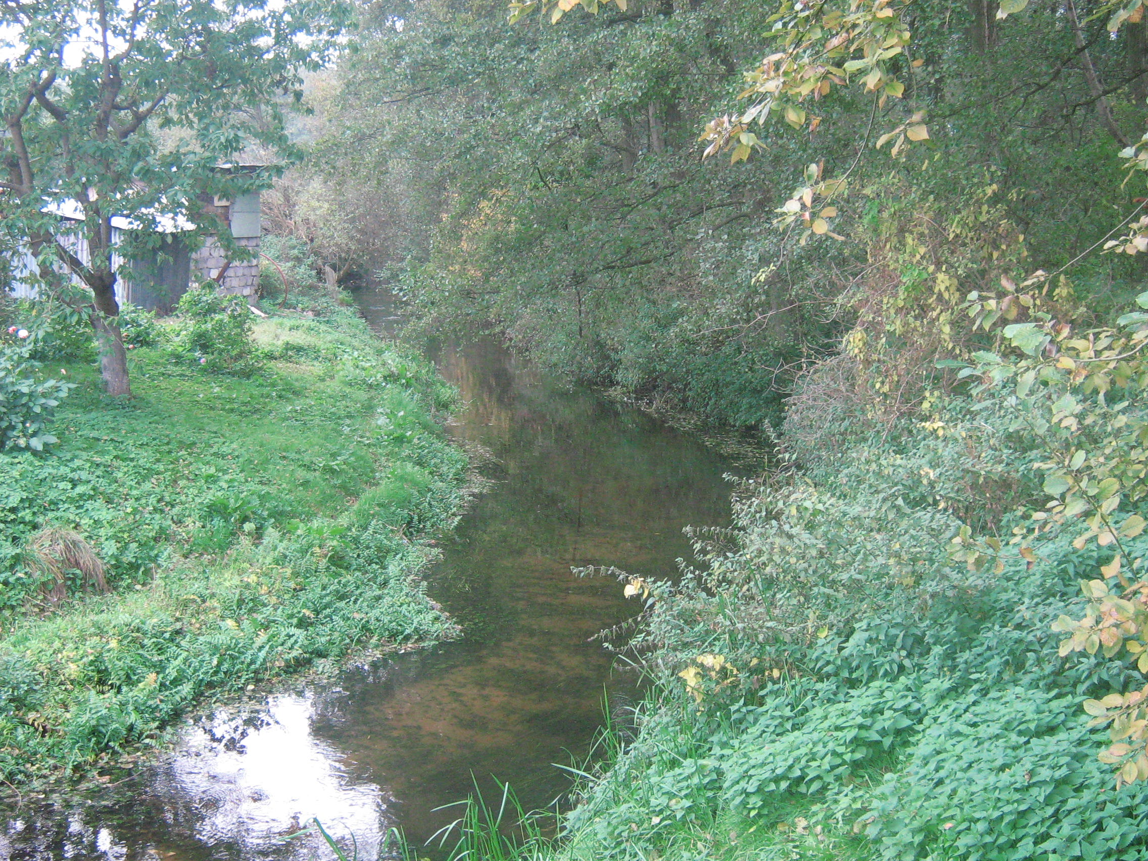 Strumyk w Mechowie.